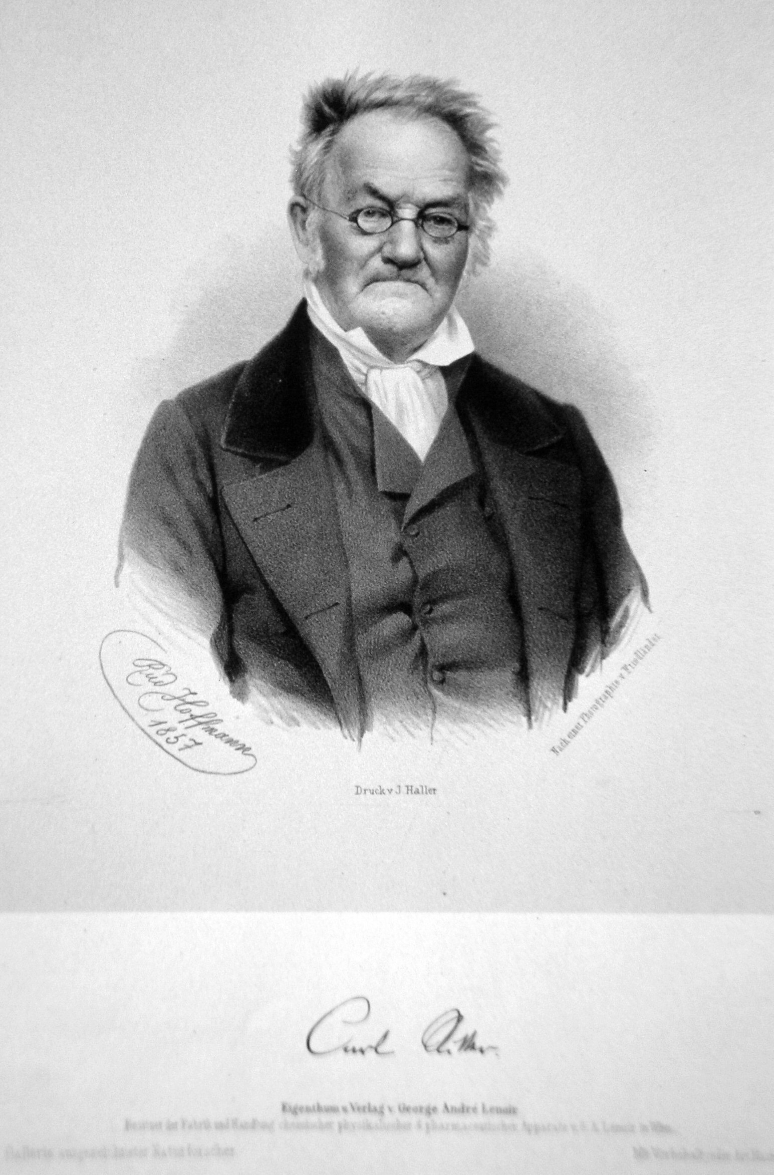 Carl Ritter (deutscher Geograph), Lithographie von Rudolf Hoffmann nach einer Fotografie , 1857